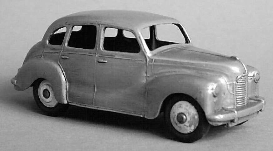 Dinky Toys - Austin Devon, uit de jaren vijftig. Eigen foto. Licensing Categorie:Afbeelding modelbouw